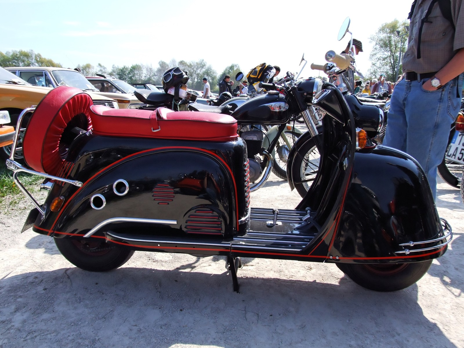 Quelle: selbst fotografiert, 04/2007 Fotograf: Späth Chr.